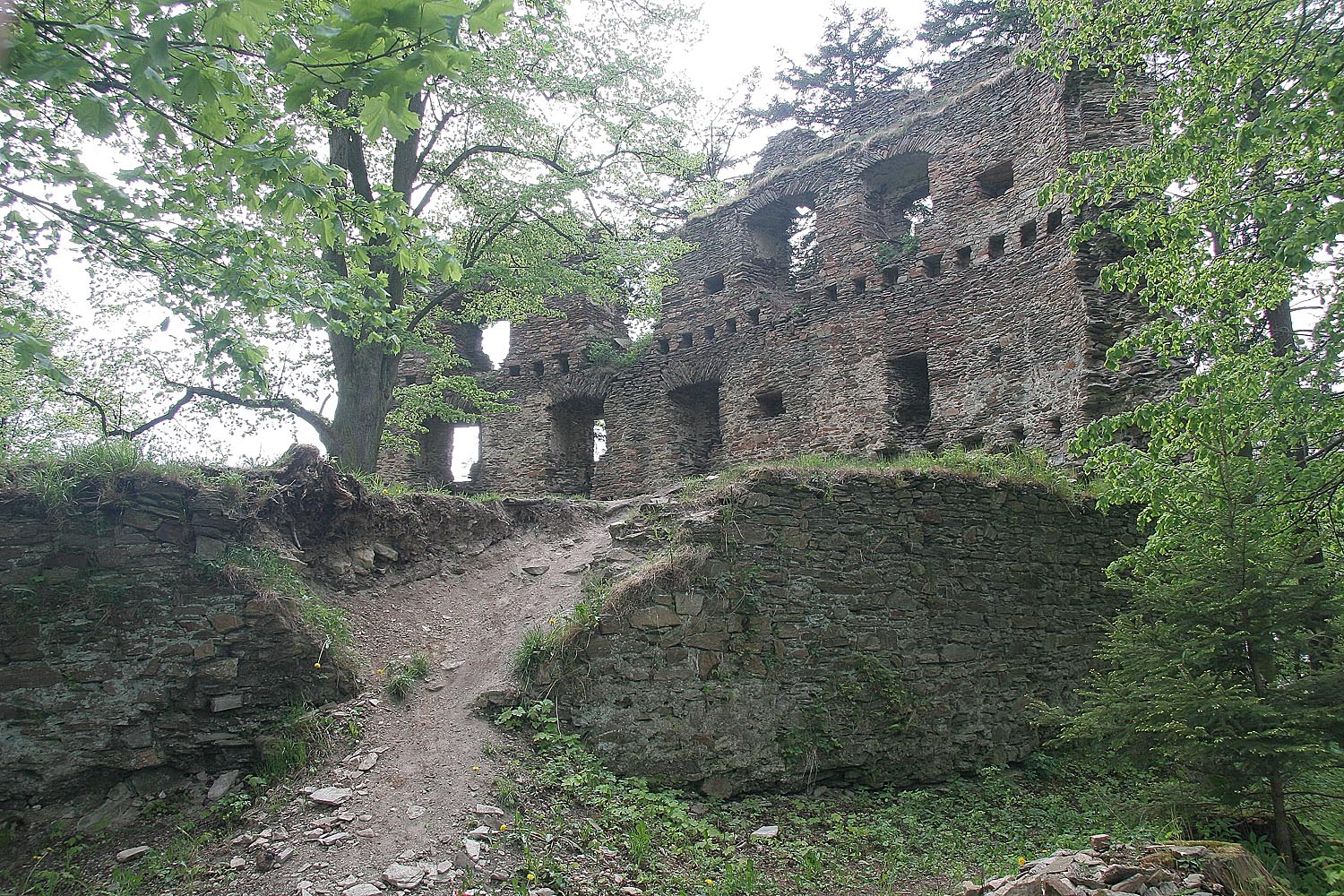 Dalečín - zřícenina hradu Dalečín, okres Žďár nad Sázavou